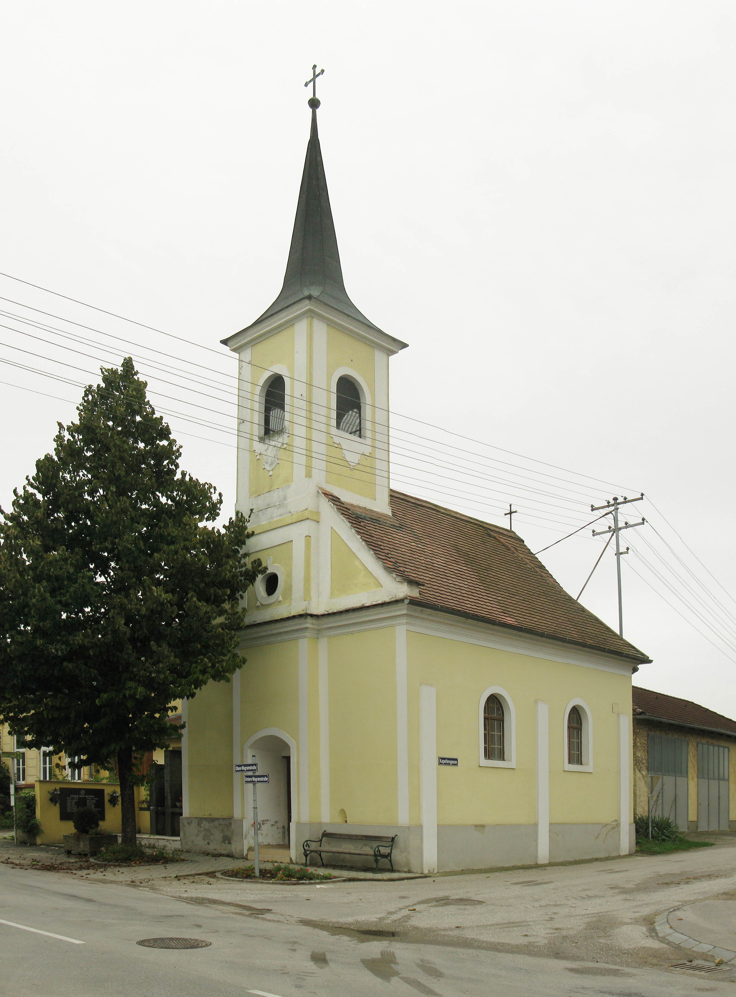 Ortskapelle hl. Wolfgang in Eggendorf am Wagram in Stetteldorf am Wagram, Bez. Korneuburg; Ansicht von Süd-Ost